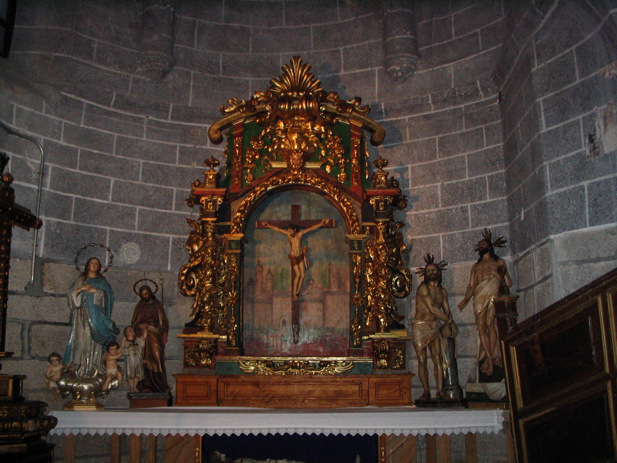 Retablo del Sagrado Corazón de Jesús, Iglesia Ntra Sra del Castillo, Macotera. Después de ser restaurado en 2006.